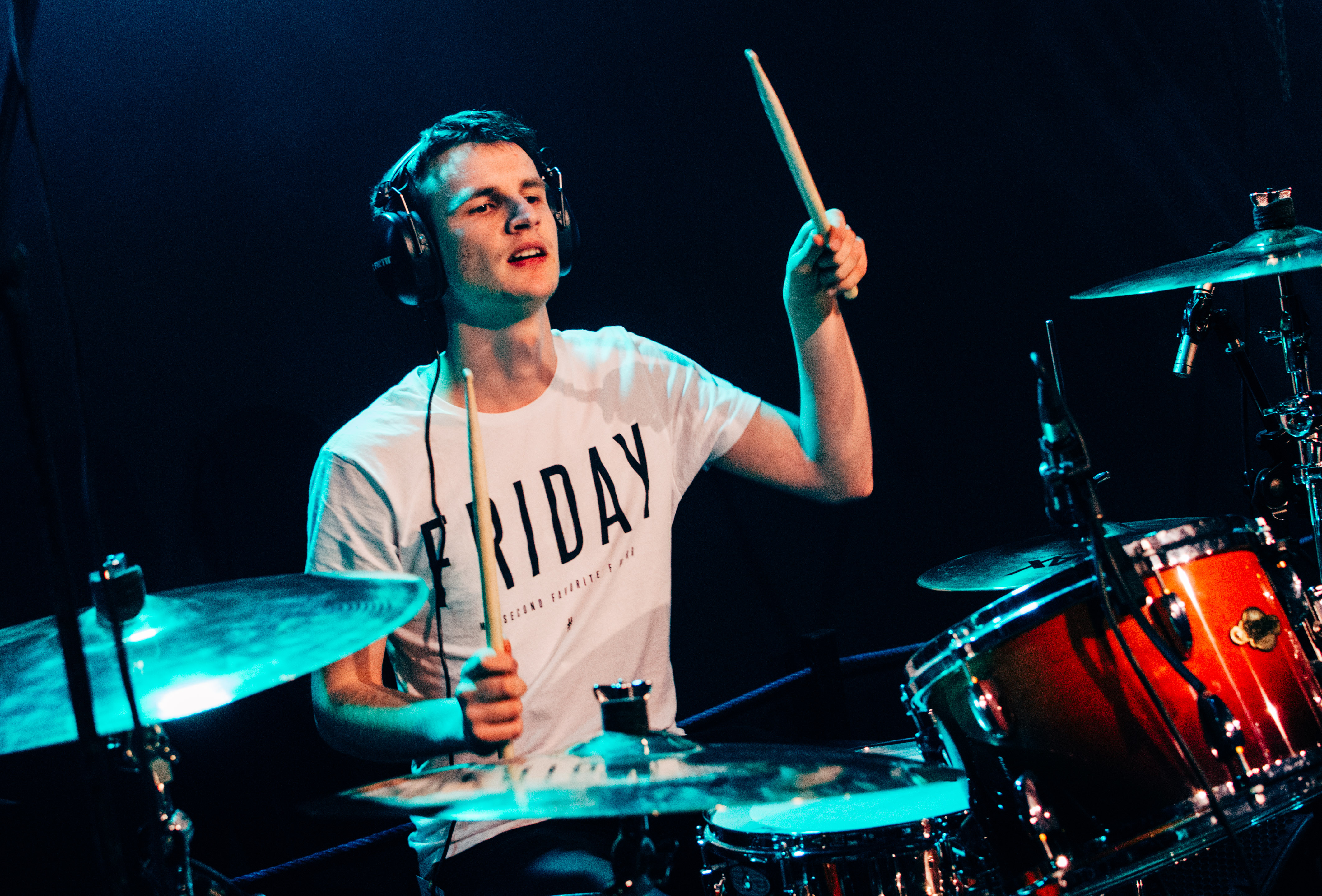 Domen Malis na nastopu skupine Artenigma, maj 2016.